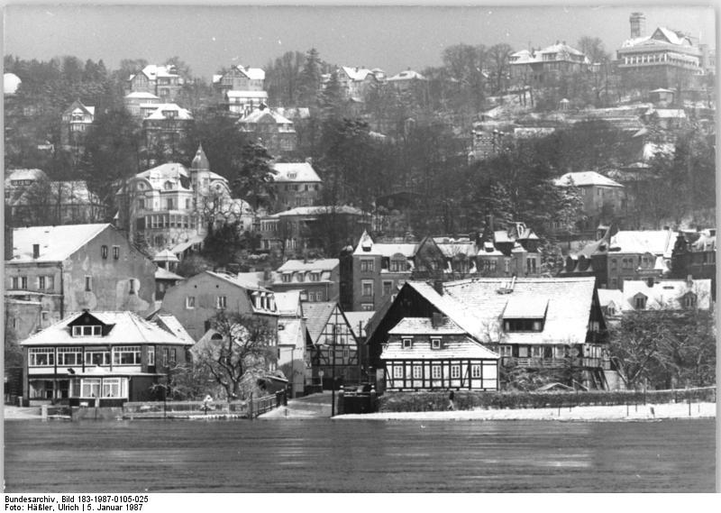 Dresden, Loschwitz, Winter, Hochwasser ADN-ZB Häßler 5.1.87 Dresden: Wetter – Der Hochwasserpegel in Dresden-Loschwitz hat 5,81 Meter erreicht. Das ist der bisher höchste Stand seit Beginn des gegenwärtigen Hochwassers.